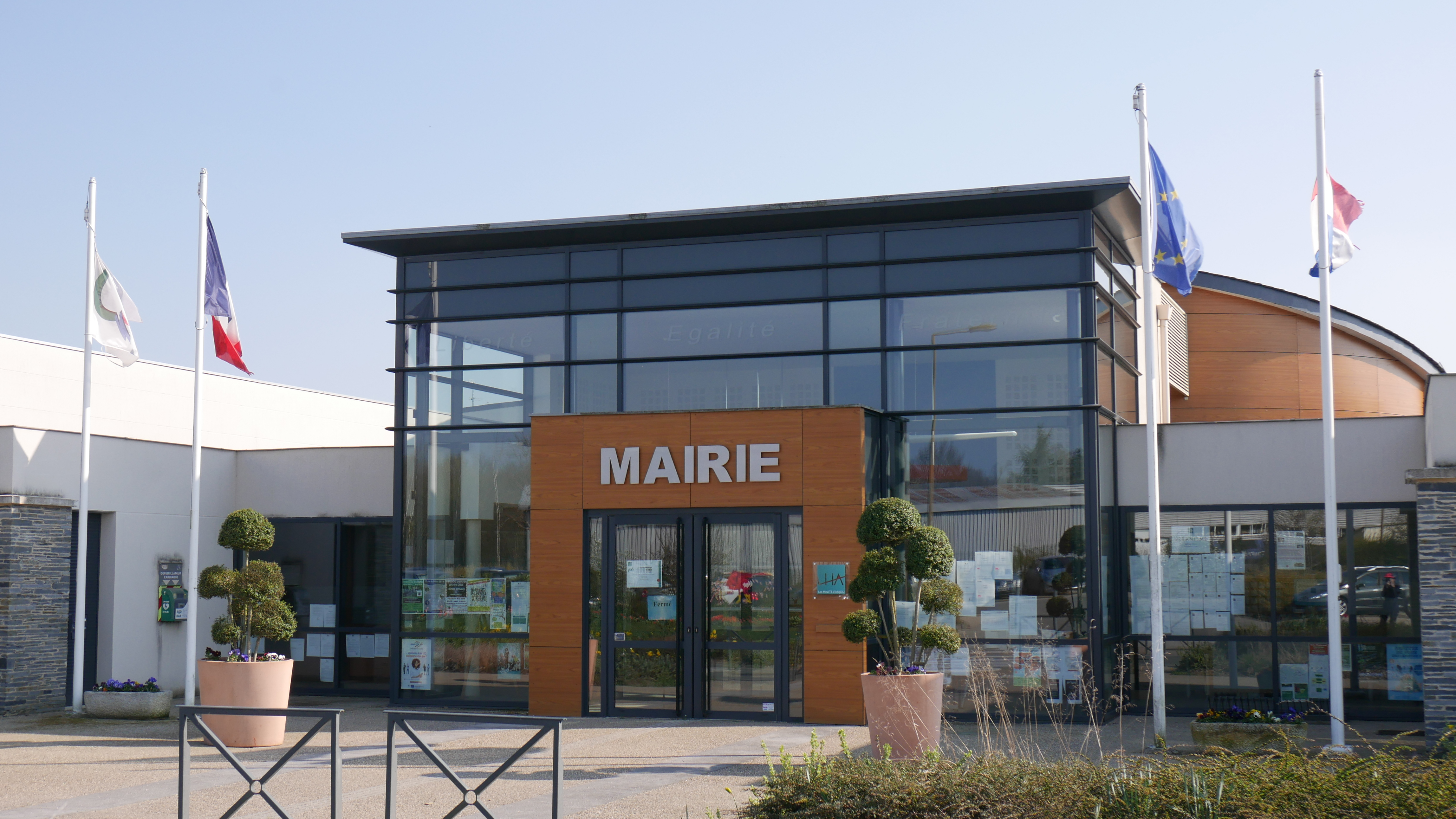 Mairie de Champigné (Maine-et-Loire, France).